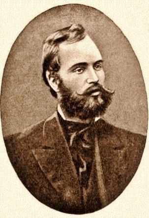 Aleksandr Dmitrievič Michajlov